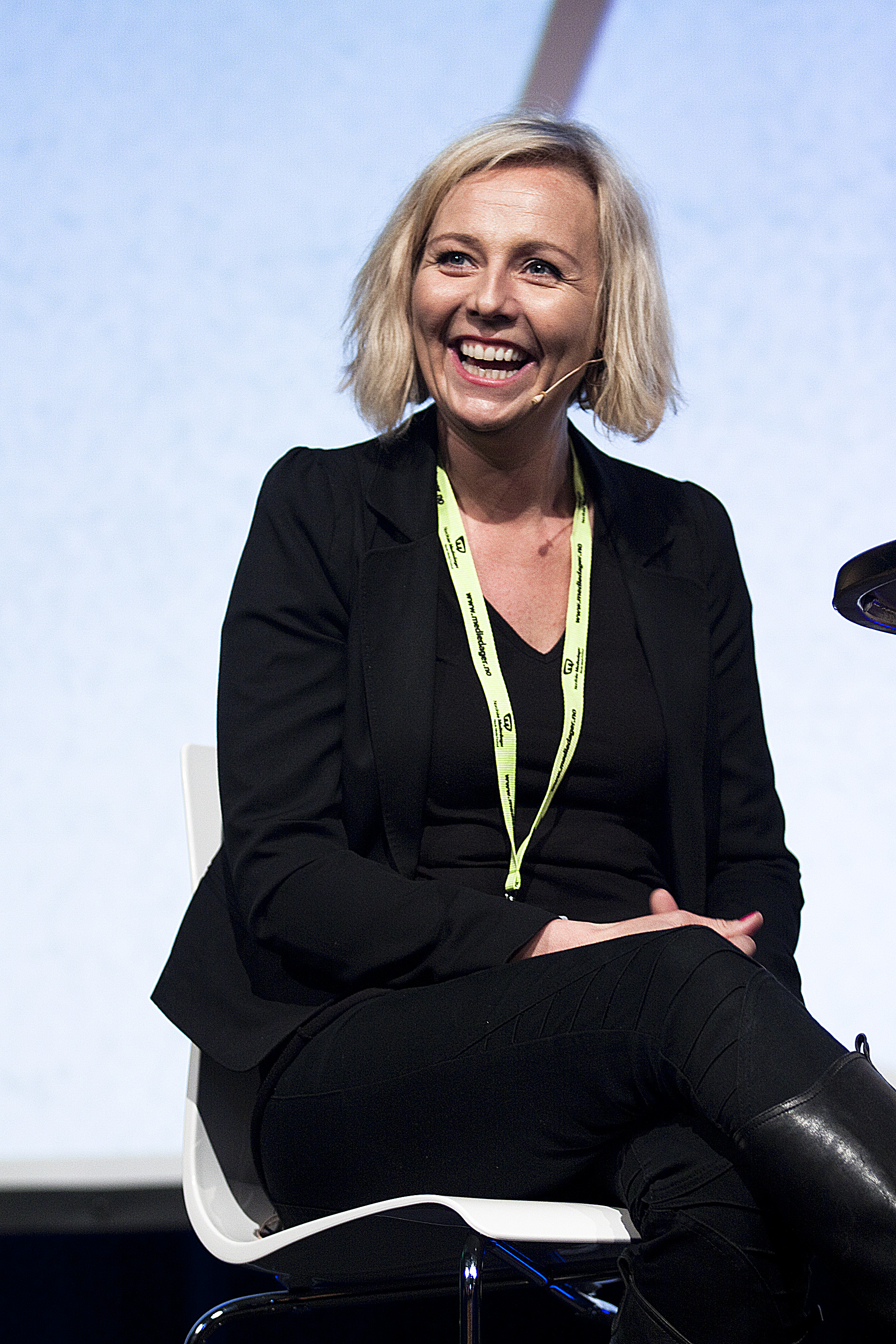 Linn Skåber gjør deg flau - igjen. Foto: Hildegunn Holtet